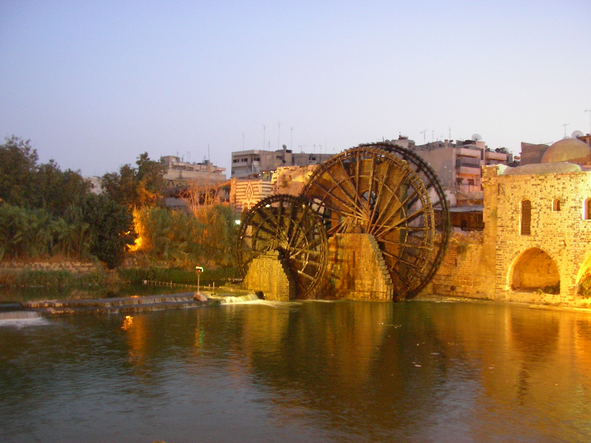 Veduta notturna di una noria ad Hama (agosto 2010)